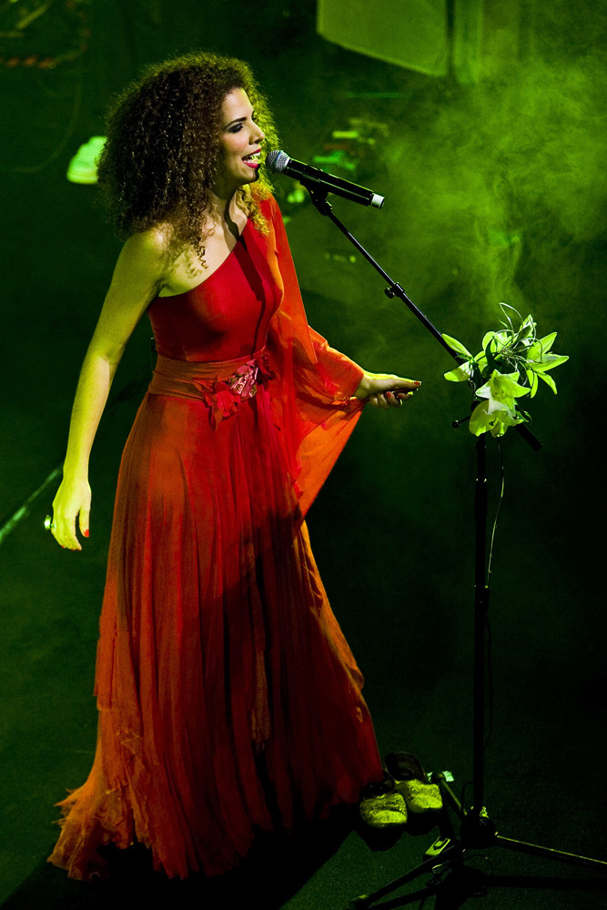 Ao vivo no Coliseu de Lisboa, 15 de Novembro 2007. Agrad�vel surpresa este concerto. Coliseu cheio que nem um ovo. Afinal n�o sabiam s� a musiquinha com o Ben Harper... Cantaram de in�cio ao fim, durante a hora e meia que esteve em palco.